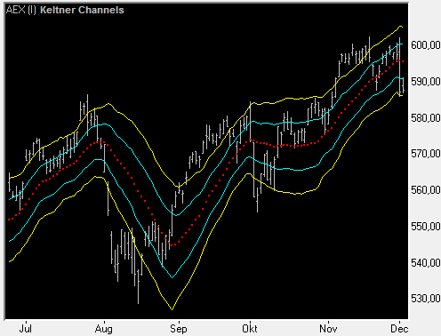 Keltner Channels met ATR berekening